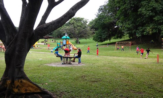 Vista del área recreativa